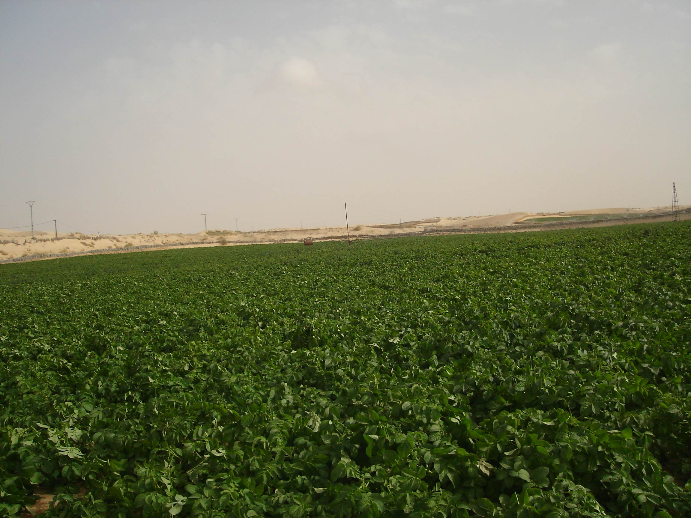 POMME DE TERRE AU COEUR DU SAHARA